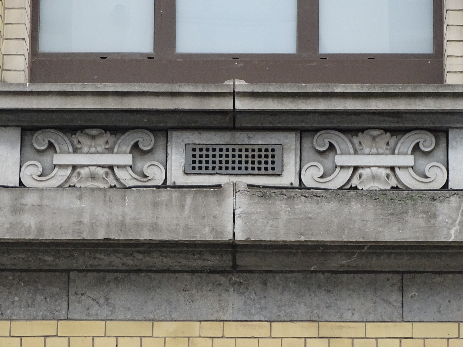 Détail de la façade de l'Institut Marius Renard, Anderlecht, 1914 (grille de ventilation).